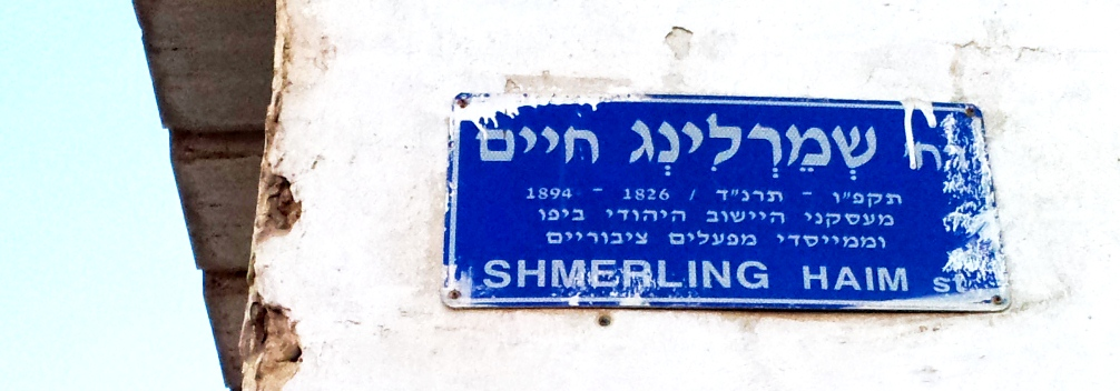 שלט רחוב שמרלינג חיים בתל אביב